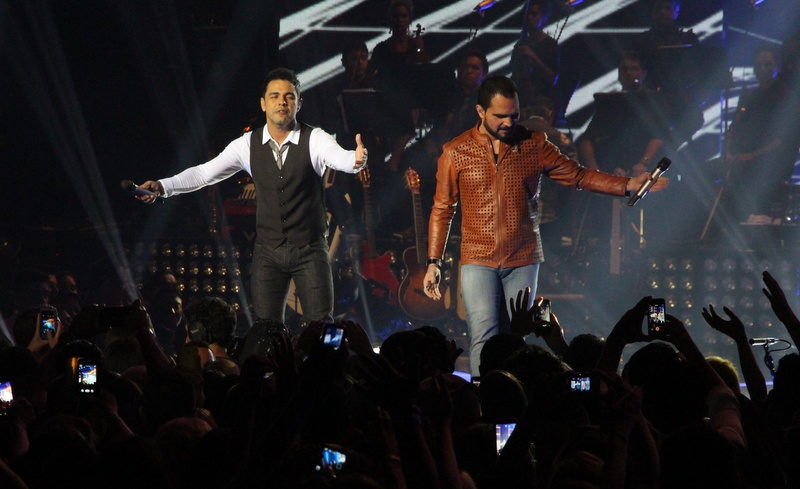 Zeze di Camargo e Luciano-028